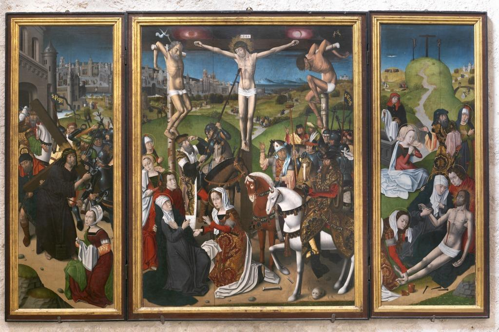 En la obra se desarrollan tres pasajes de la pasión de Jesucristo: Jesús llevando la cruz a cuestas, en el panel izquierdo, la crucifixión, en la tabla central, y el entierro de Cristo, en el panel derecho. En la primera tabla, Jesús aparece mientras se dirige hacia el monte Gólgota, donde sería crucificado, y Simón el Cireneo aparece ayudando al Señor a llevar su cruz. En la tabla del centro, Cristo aparece ya crucificado y muerto, y el centurión romano aparece clavándole en su costado una lanza tras de lo cual, según los Evangelios, brotó sangre y agua. Y en la tabla derecha la Virgen María aparece recibiendo el cuerpo de su hijo muerto.